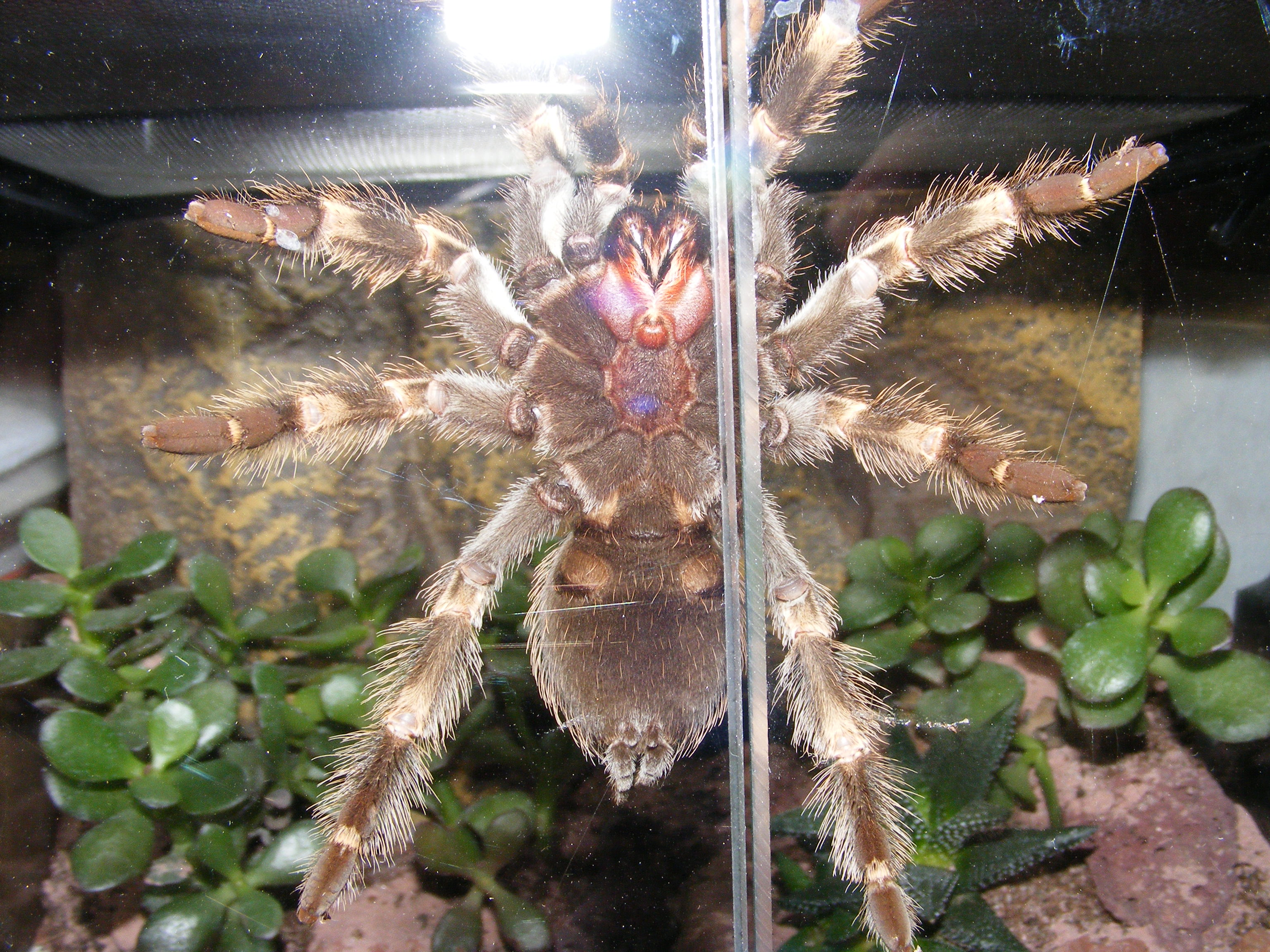 Brachypelma Smithi von unten